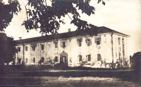 Беларуская (тарашкевіца): Слонім (Słonim), вуліца Жыровіцкая (vulica Žyrovickaja). Кляштар бэнэдыктынак